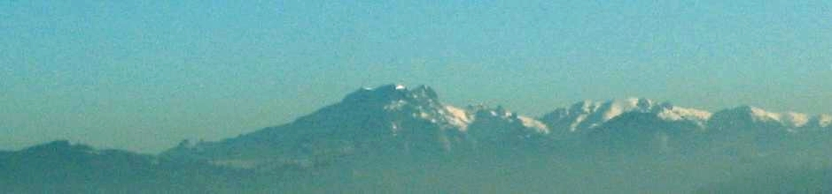 A Csukás-hegység hófödte csúcsai, középen a Csukás-hegy (1954 m), Erdély